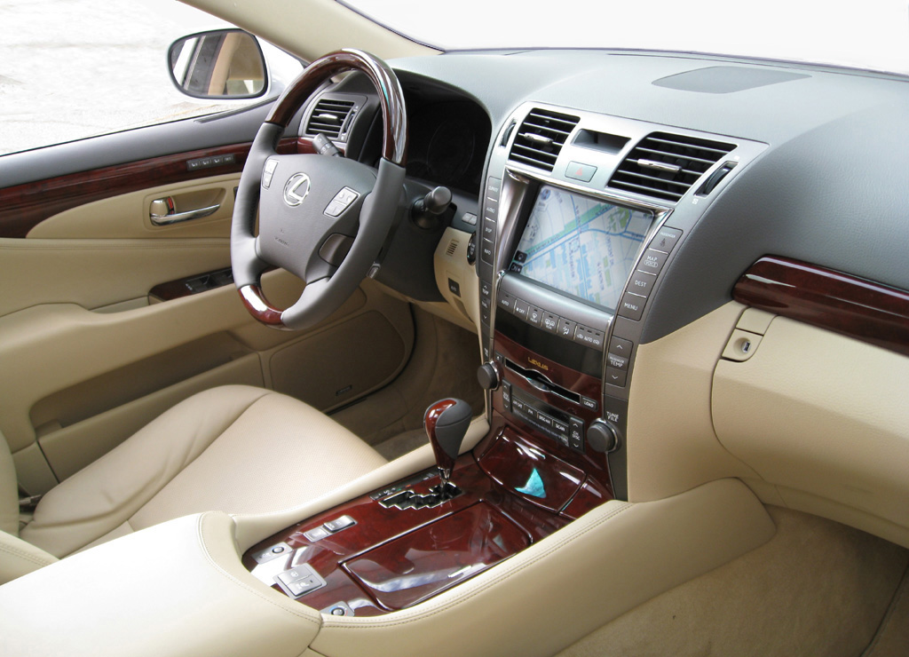 LS 460 front cabin